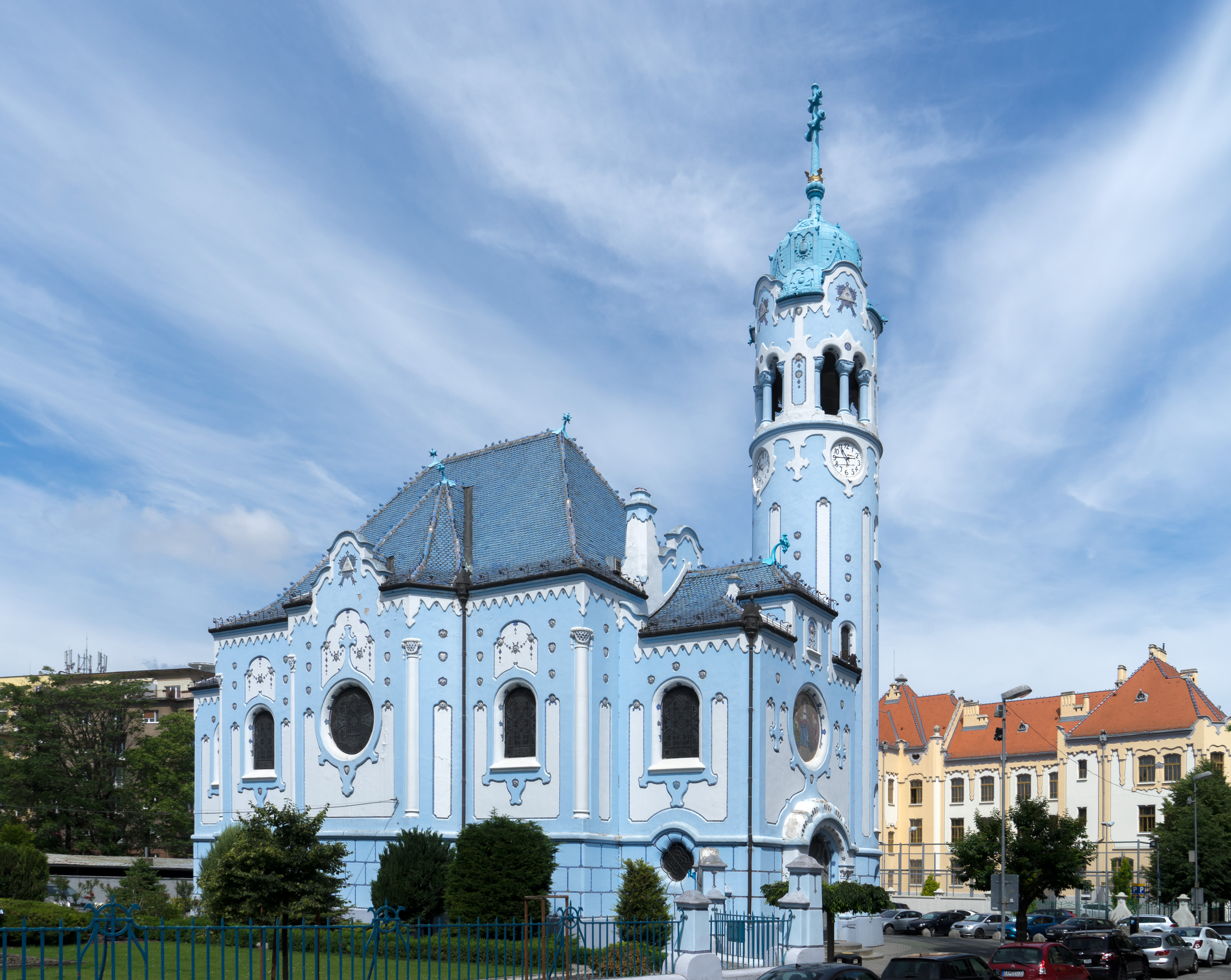 Blue Church, Bratislava, Southern Side